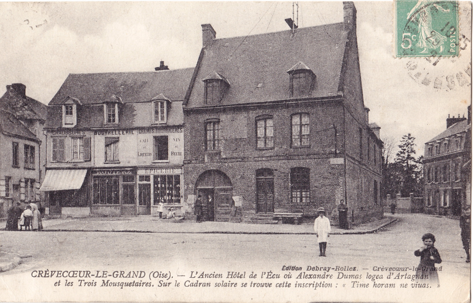 Carte postale ancienne éditée par Debray-Bollez :CREVECOEUR-LE-GRAND - L'Ancien Hotel de l'Ecu où Alexandre Dumas logea d'Artagnan et les Trois Mousquetaires. Sur le cadran solaire se trouve l'inscription : Time horam ne viuas